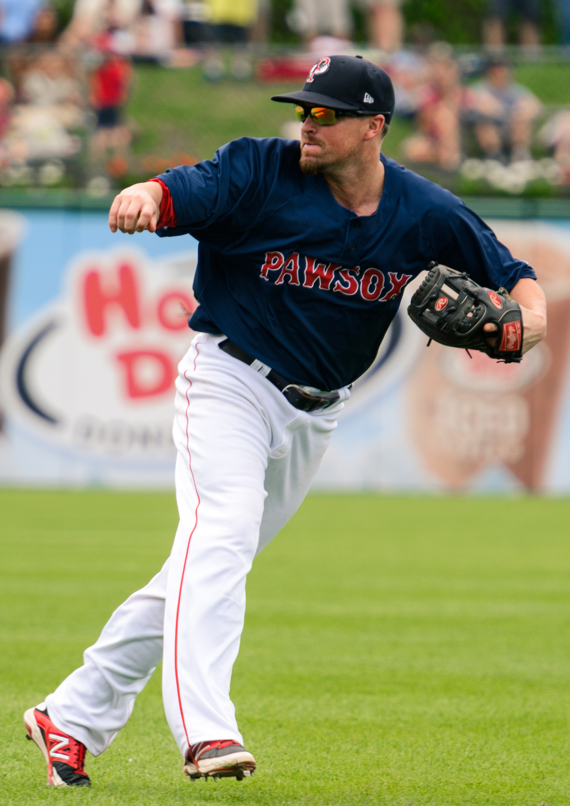 Mike McCoy